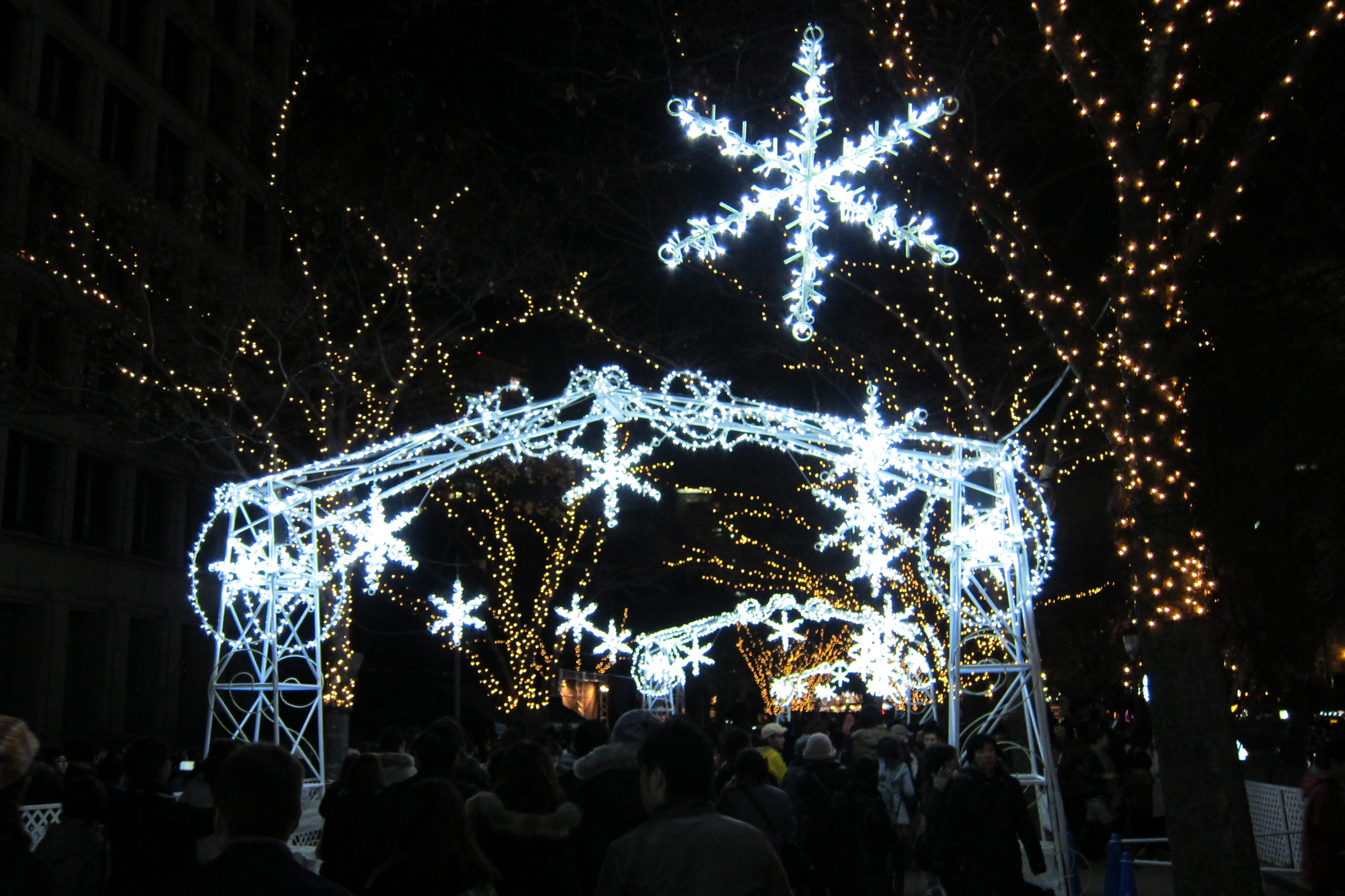 The OSAKA Hikari-Renaissance (大阪光のルネサンス) at Osaka City, Japan.